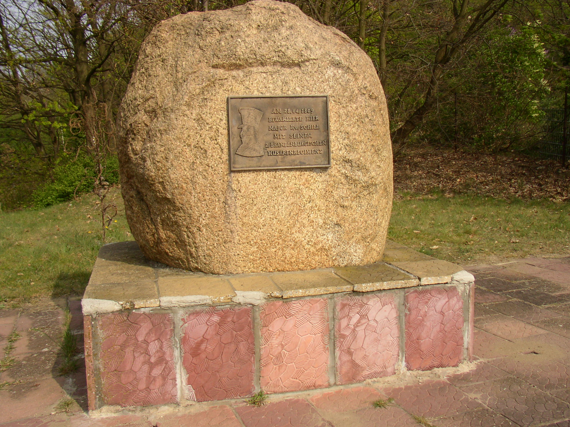 Schill-Gedenkstein in Geltow Landkreis Potsdam-Mittelmark /Memorial of Prussian hussar Ferdinand von Schill